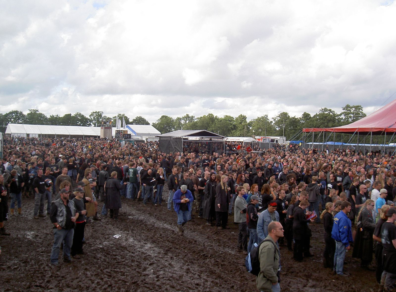 Wâldrock 029